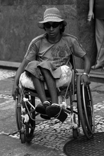 Cadeirante nas ruas de São Paulo em 2009.